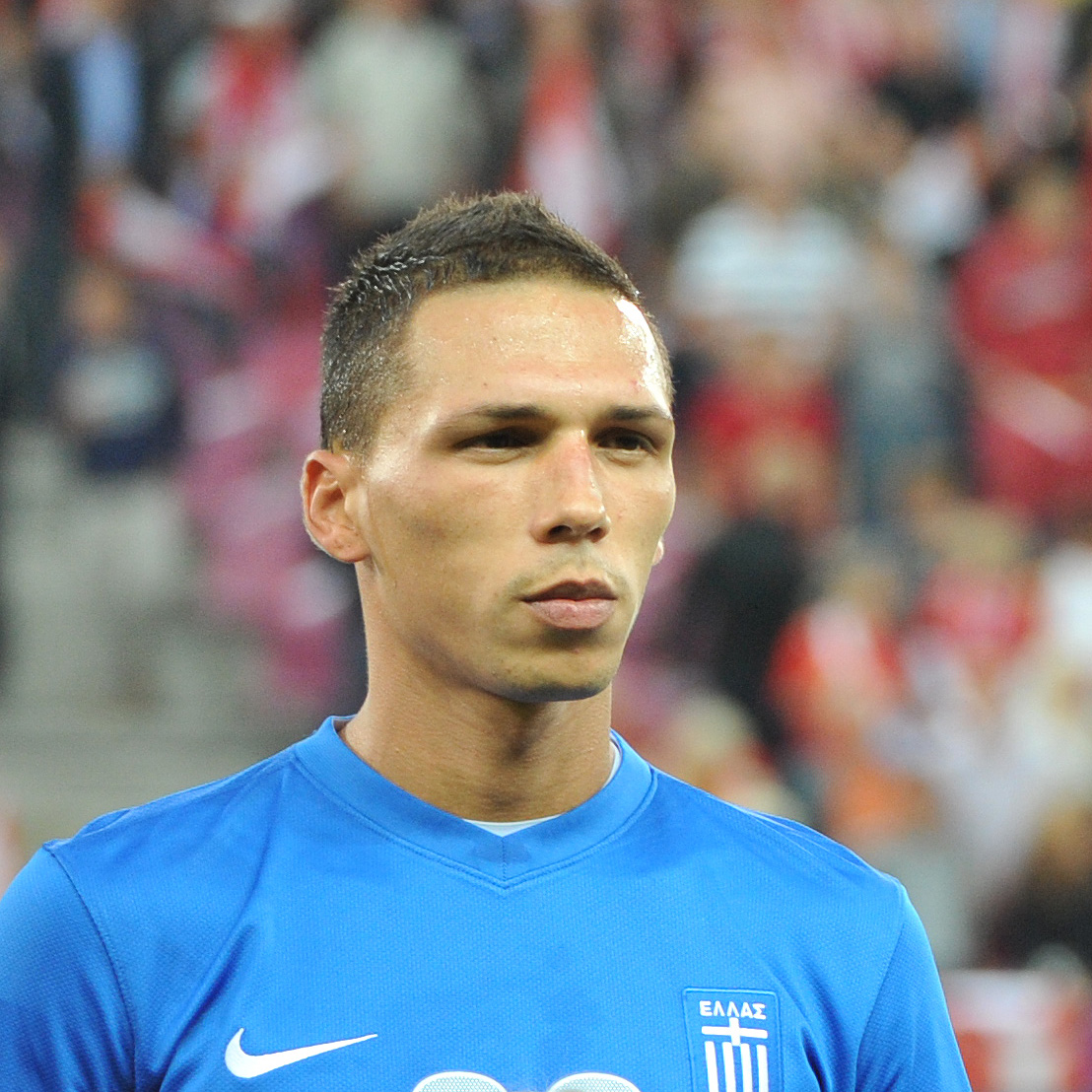 Freundschaftliches Länderspiel Österreich - Griechenland am 14. August 2013 in Salzburg: Jose Holebas